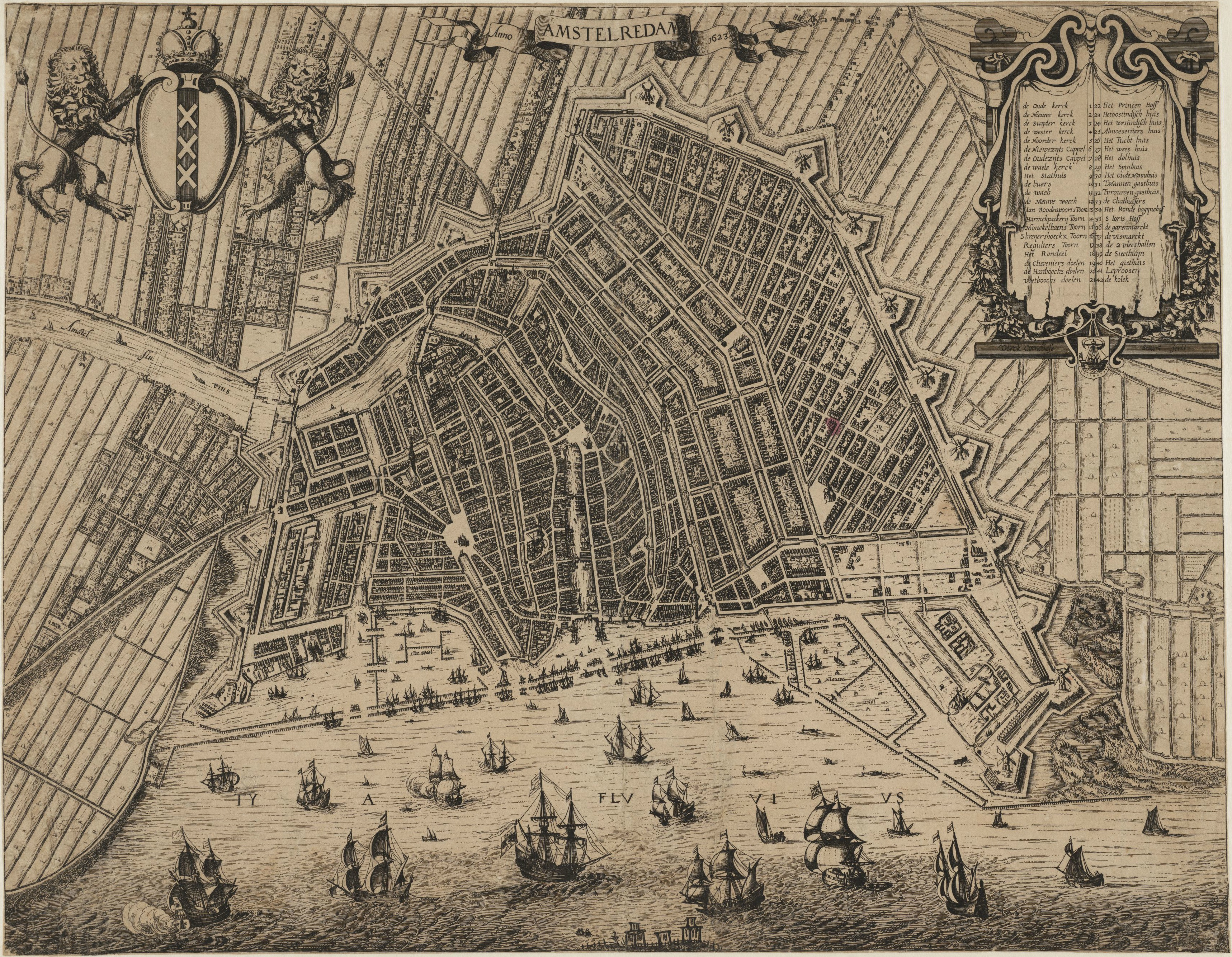 Plattegrond van Amsterdam. Schaal ca. 1:7.000. Gedetailleerde kaart van de stad met een ingevulde derde uitleg van 1610-1613. De Westerkerk staat nog in de stijgers. De verdere uitleg is met een dunne lijn aangegeven. Deze werd pas gerealiseerd met de Vierde Uitleg van 1662. Oriëntatie: zuidzuidwest boven.